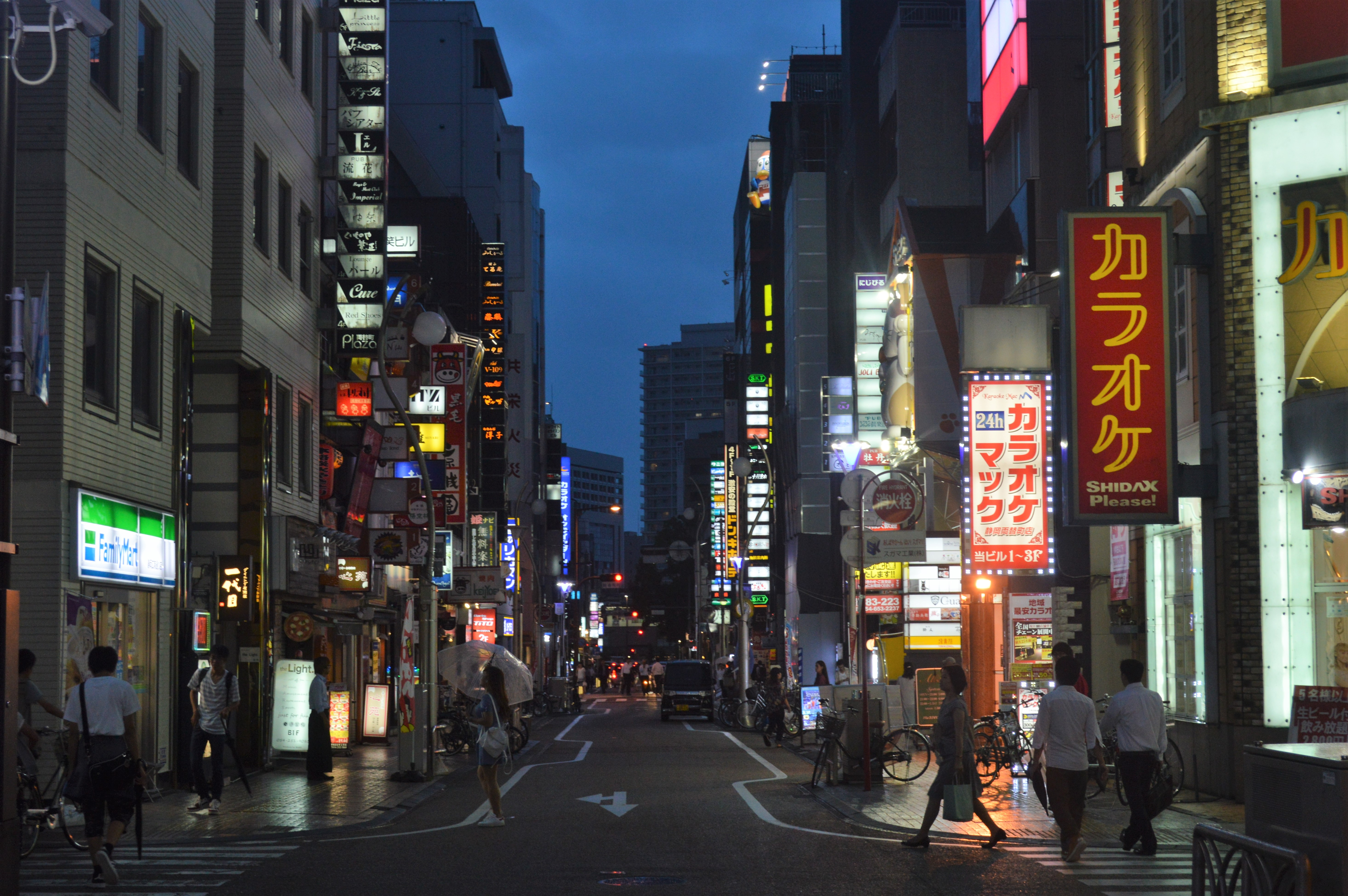 静岡市の両替町通り。